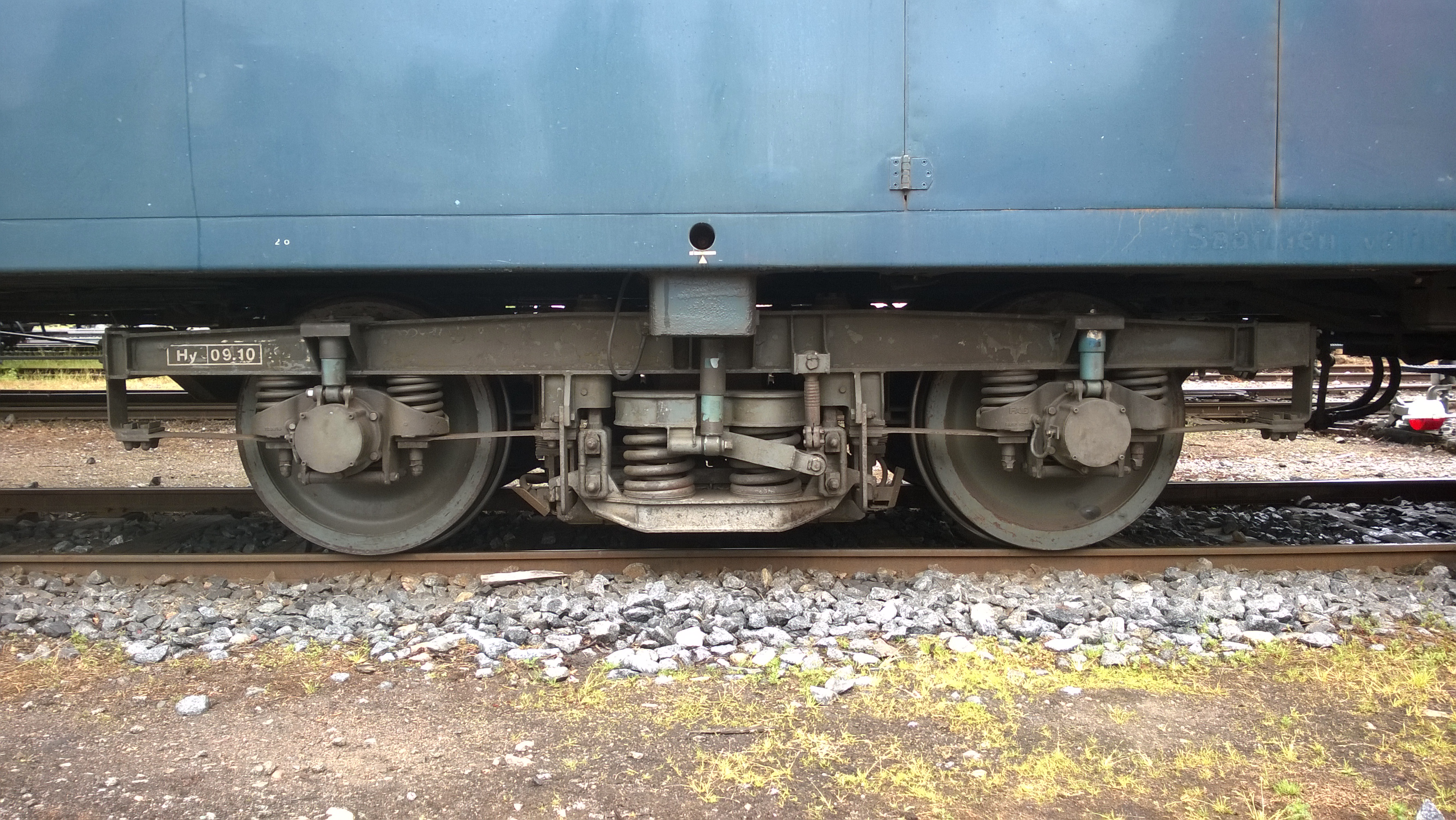 Rkt 23839 är en resturangvagn som användes av VR i Finland